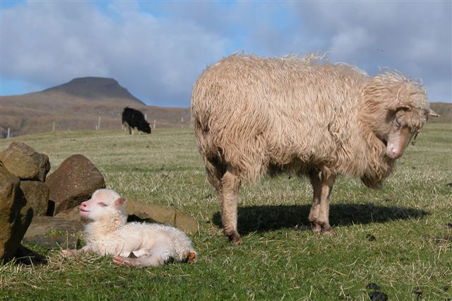 Size de iyi bayramlar ve Bat(fs) katkılarınız için teşekkürlerimi fışkırtırım efem... B. Q. 12:07, 8 Aralık 2008.